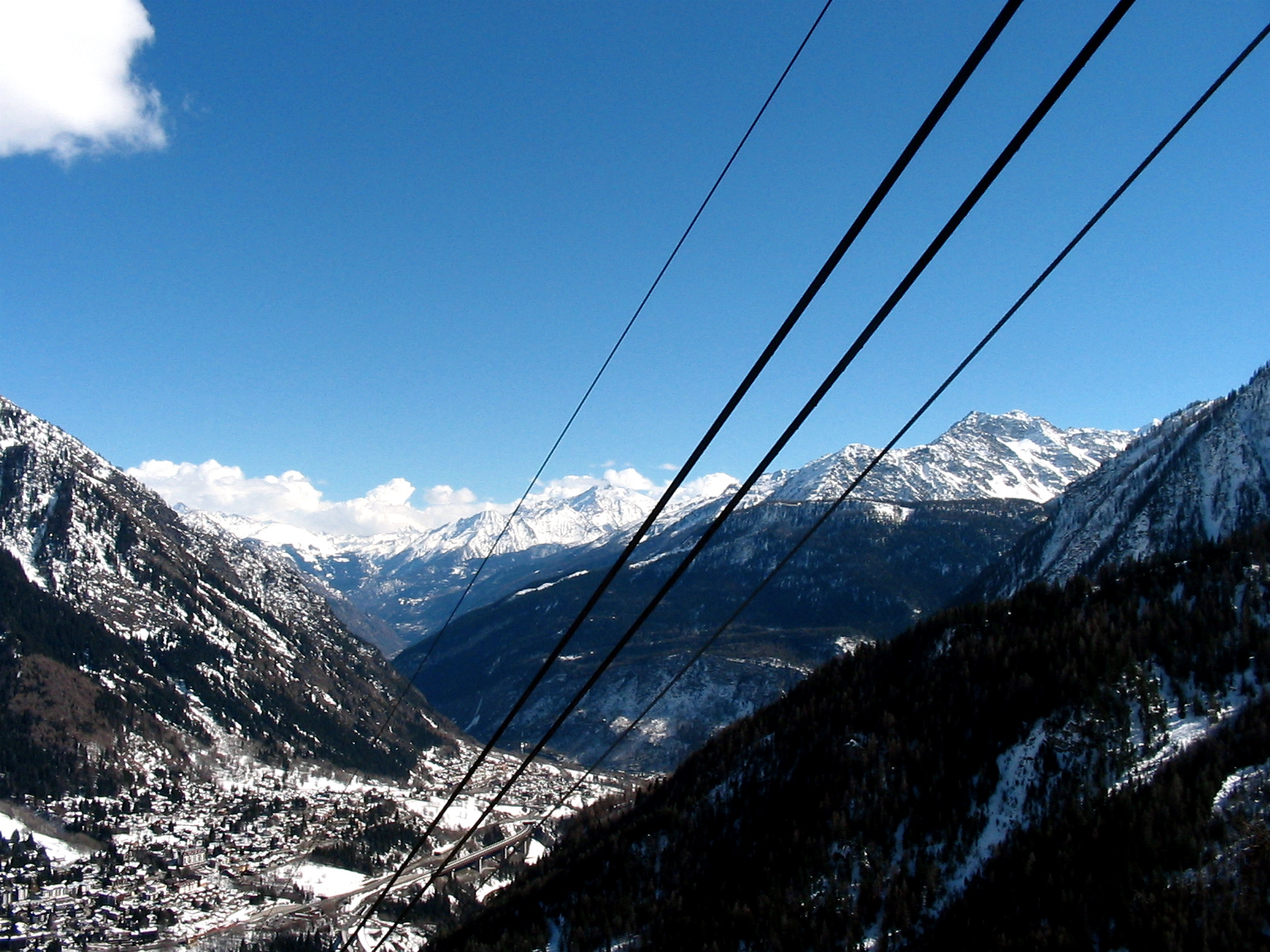 Courmayeur, Valle d'Aosta, Italia